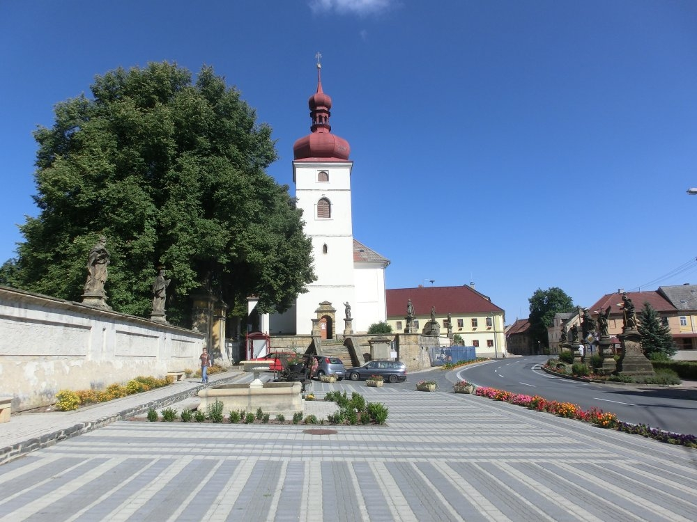 Kostel Nanebevzetí Panny Marie (Liběšice), Liběšice